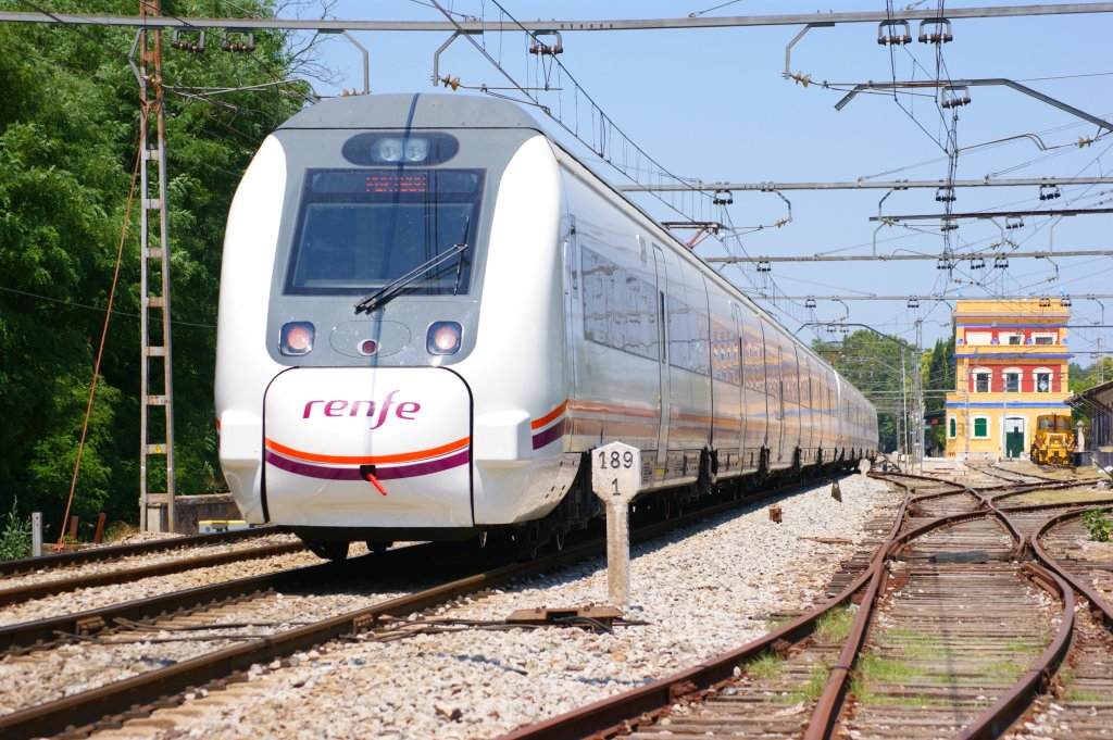 Una doble unidad 449, en mando múltiple, realizando un servicio de Media Distancia a Portbou, en la estación de Caldes de Malavella.